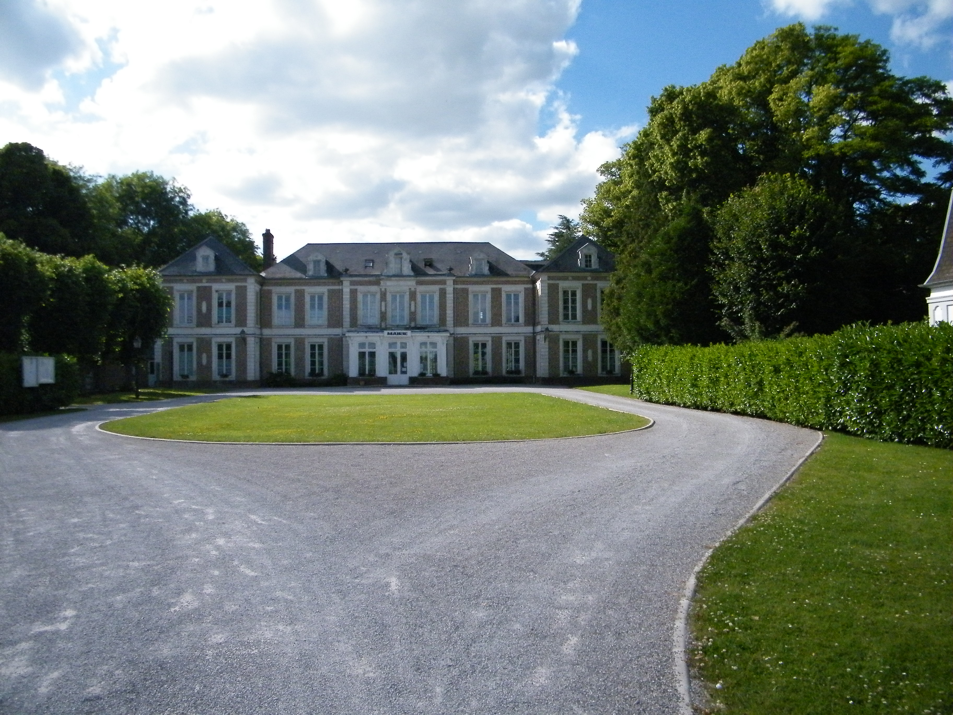 Sailly-Flibeaucourt, mairie.